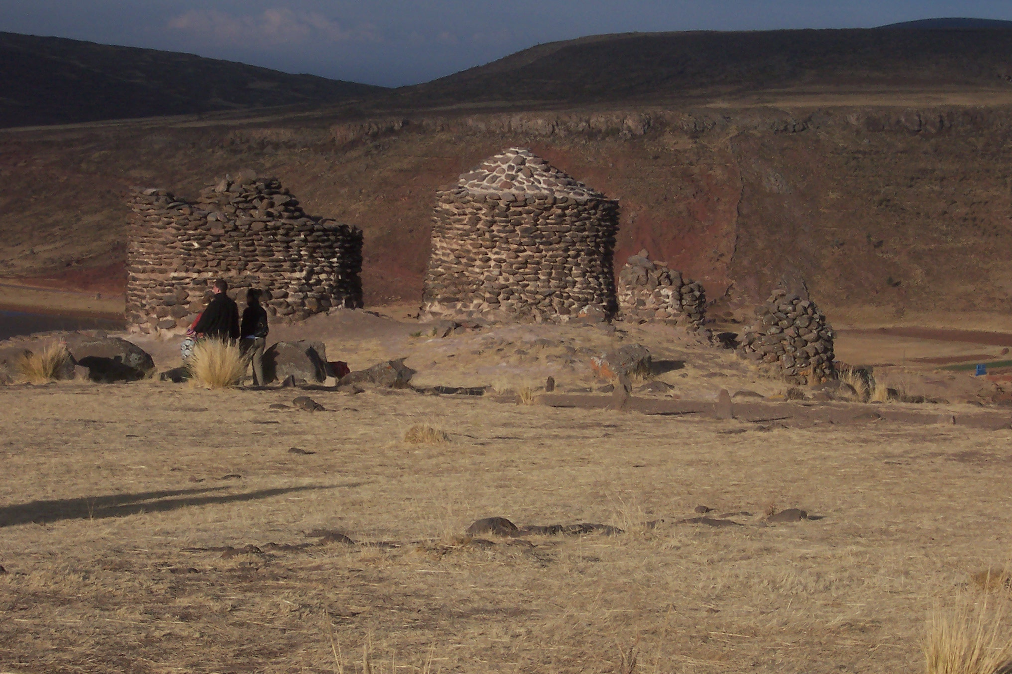 Chulpas de la época Kolla, en Sillustani, 34 km de Puno, Perú. Autor: Alfredobi Fecha: Agosto 2006